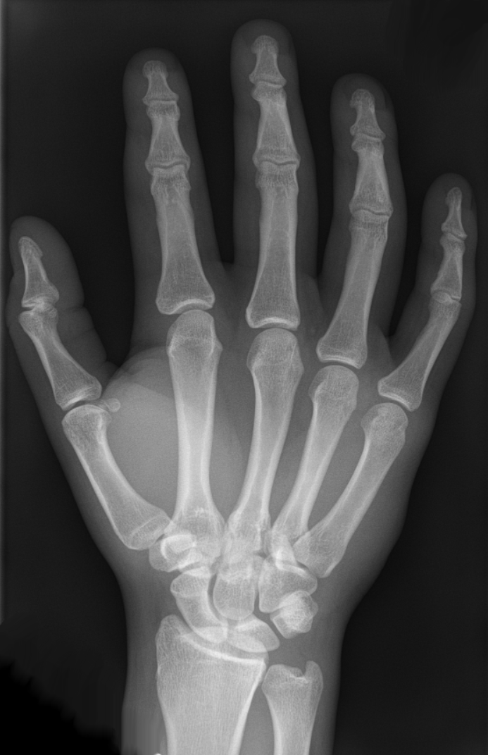 Handskelett im Röntgenbild